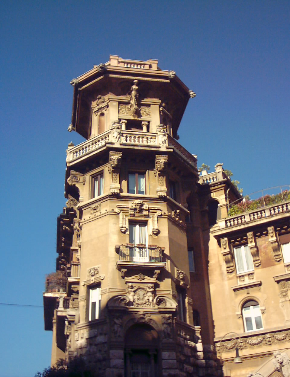 palazzo - Quartiere Coppedè